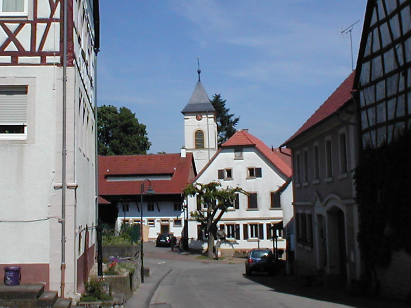 Ortsmitte von Sinsheim-Hasselbach (Grundstraße) mit Blick af den Turm der evang. Kirche